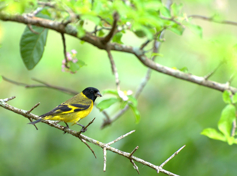 EPR - VIVEIRO DE MUDAS NATIVAS - Fazenda Vô-Vó - Piraju-SP